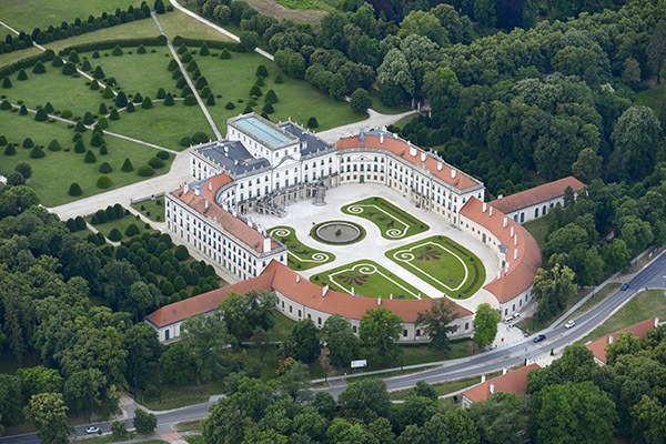 Esterházy-kastély légi fotó, Fertőd